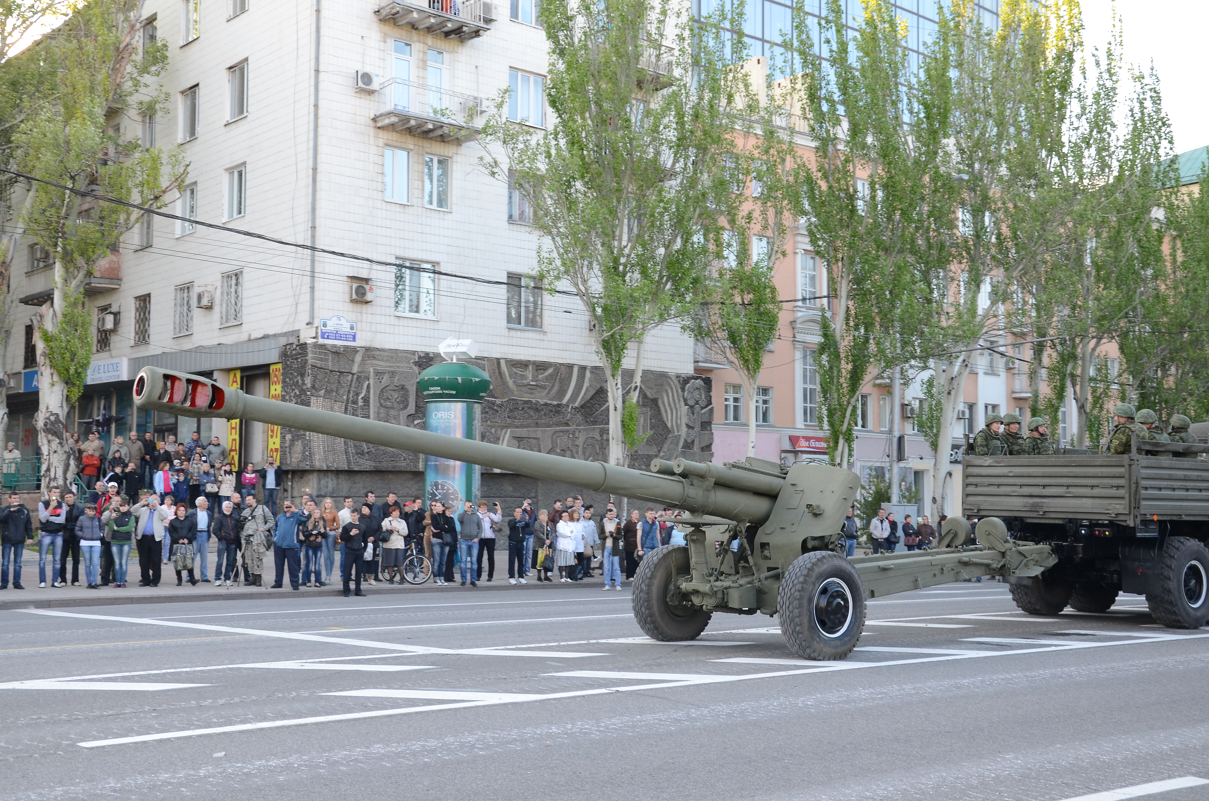 Репетиция парада в честь дня Победы в Донецке